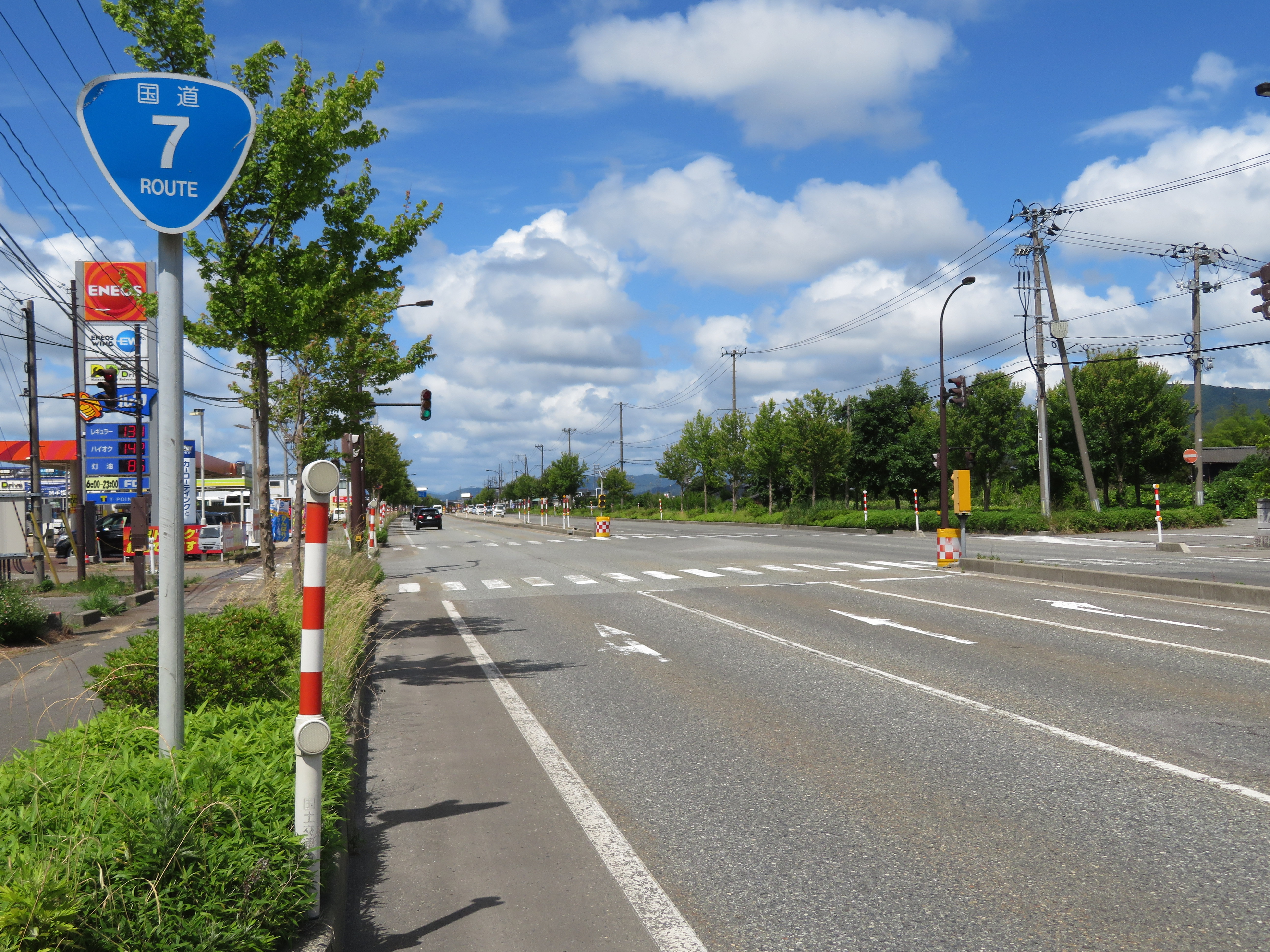 国道7号中条黒川バイパス新潟県胎内市長橋付近（村上方面を撮影） Canon PowerShot SX720 HS